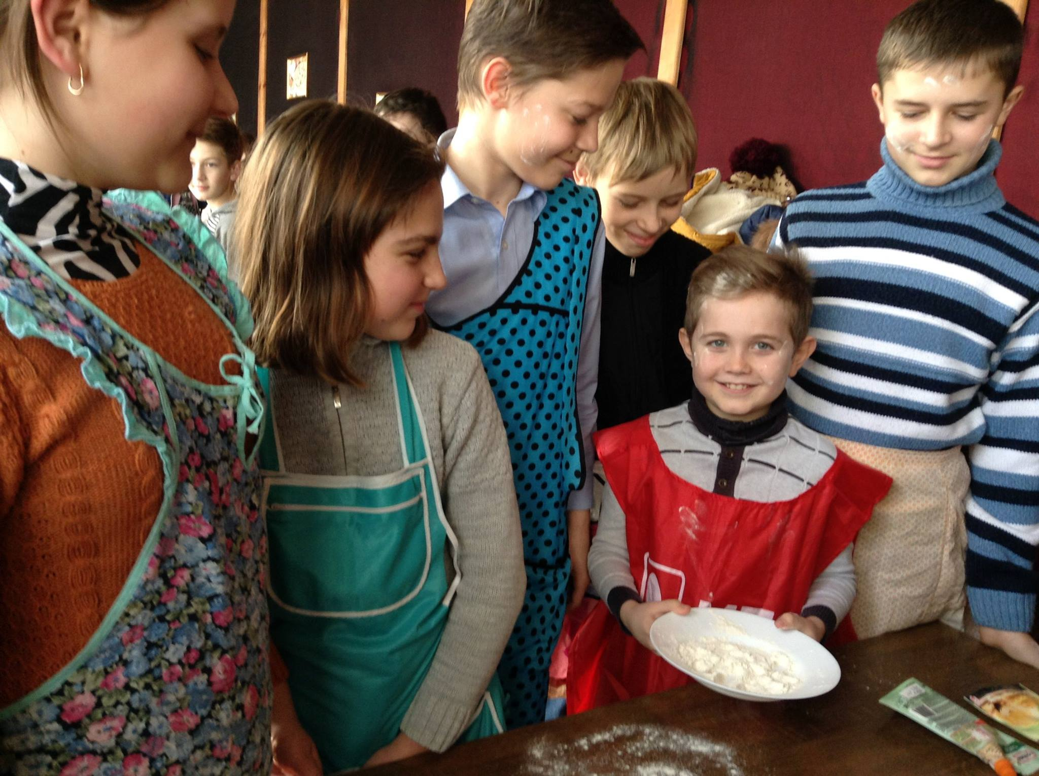 Проект "Здорове харчування - цікаве спілкування" реалізовується у Новоукраїнці